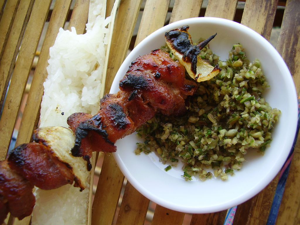 Cơm lam, muối xả kèm heo xiên